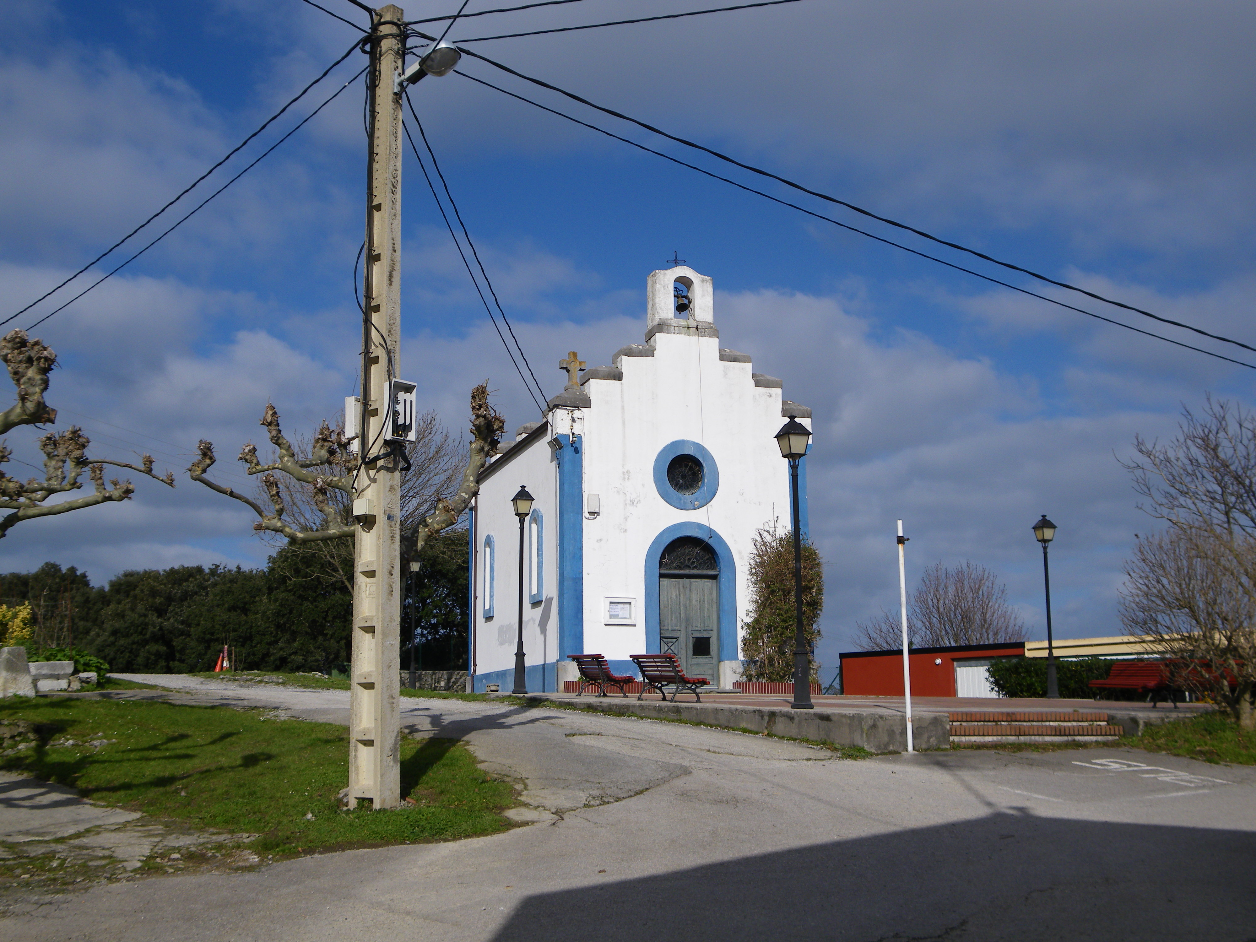 Sonabiako baseliza, Oriñon, Kantabria.